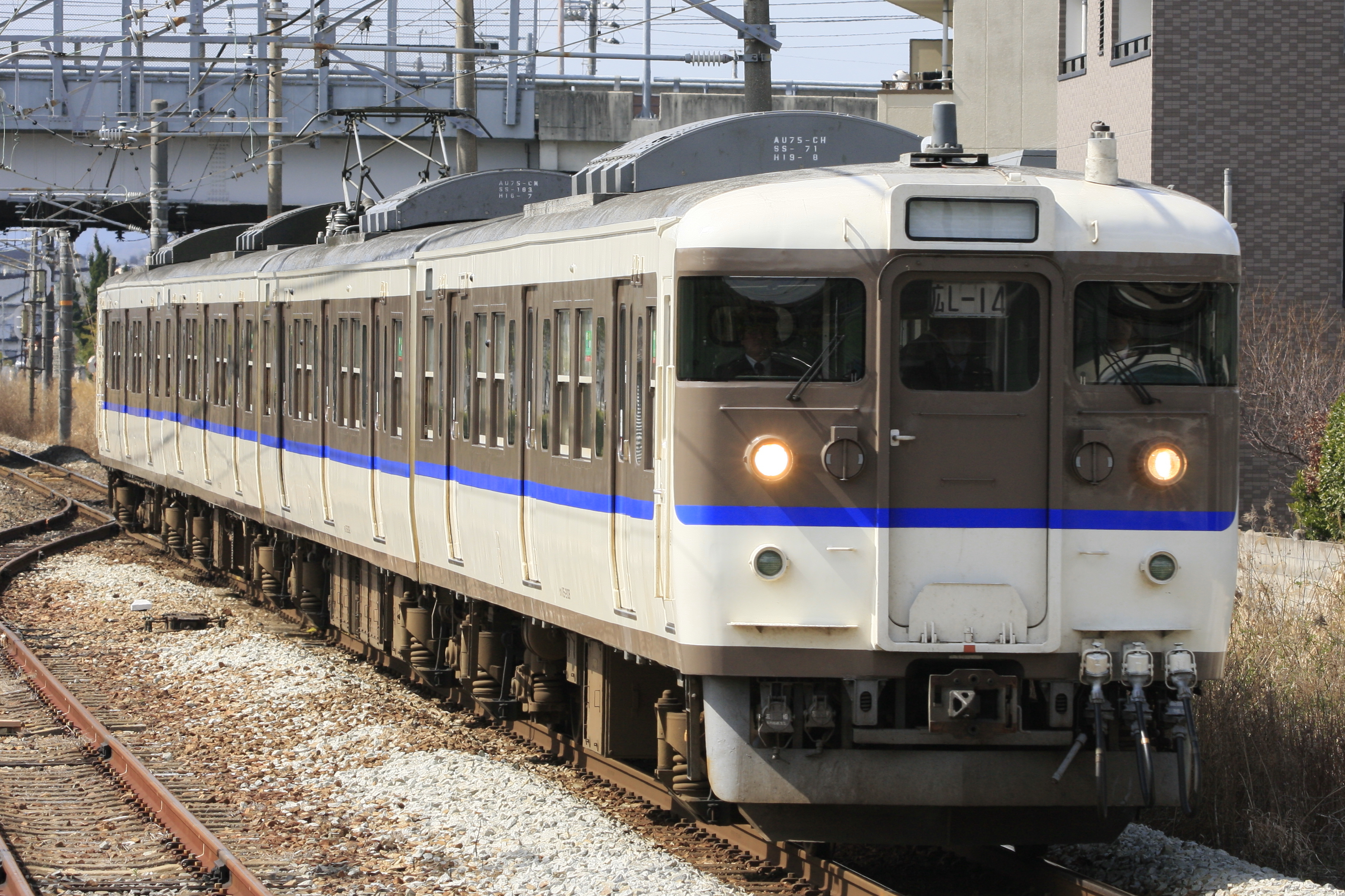 広ヒロ所属の115系L14編成 中庄駅にて撮影